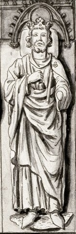 Odo Pařížský